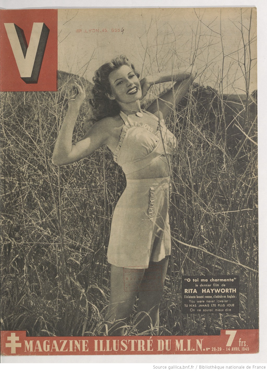 La couverture du V magazine